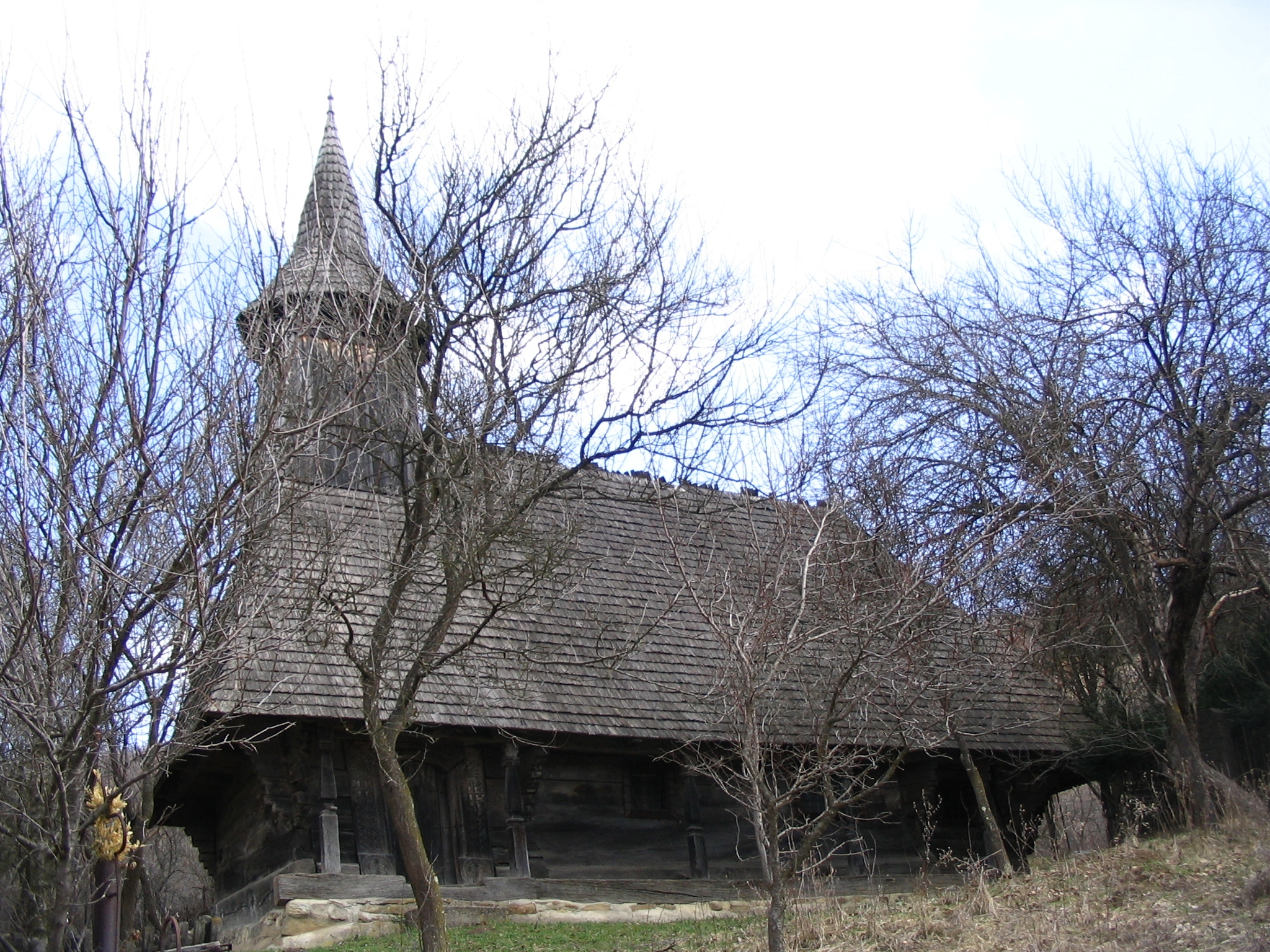 Biserica de lemn din Hida, judeţul Sălaj. Autor: Bogdan Ilieş Data: aprilie 2006 Categorie:Biserici de lemn din Sălaj (imagini)